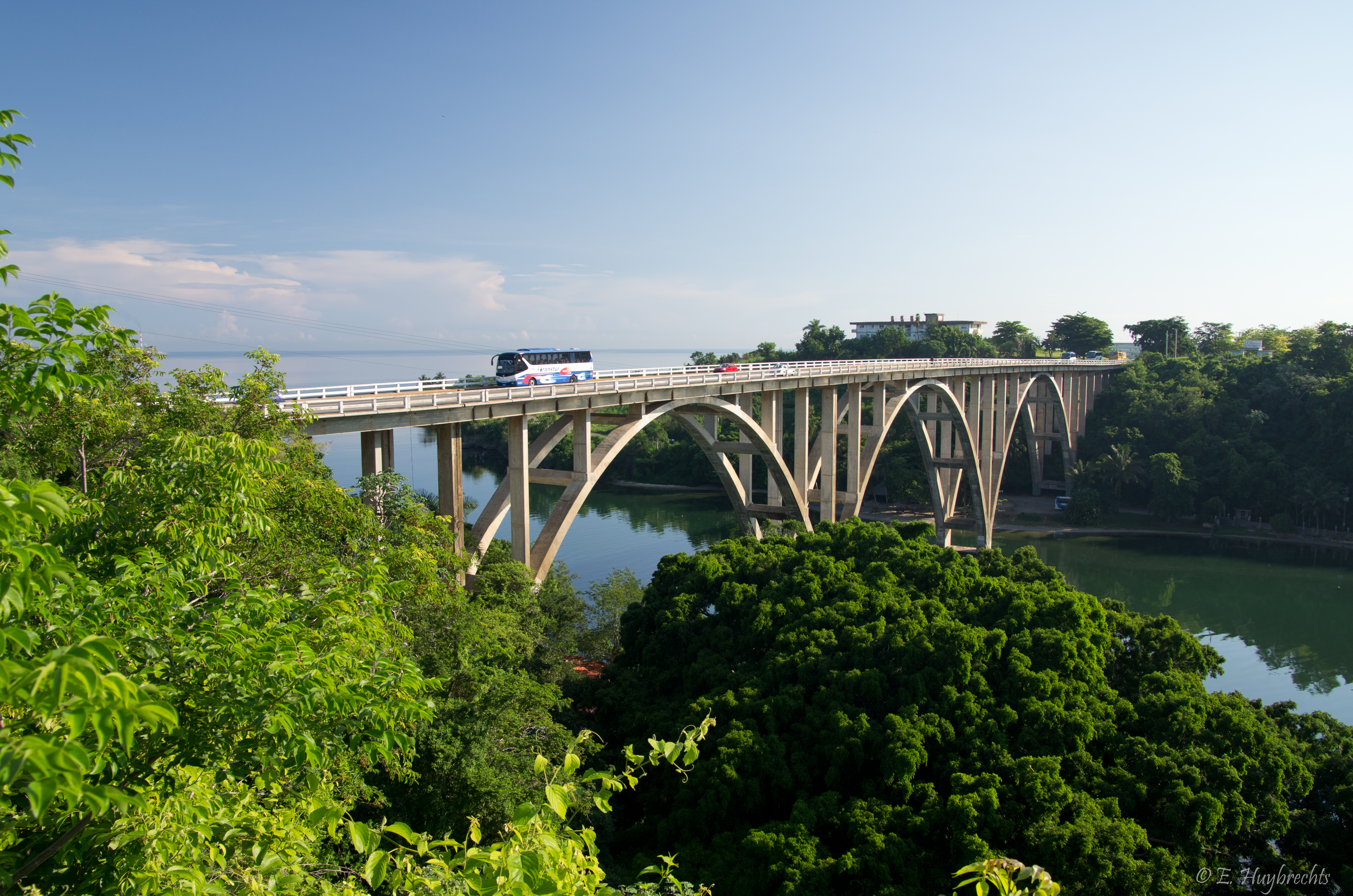 21 juillet 2011 (K5_02424)